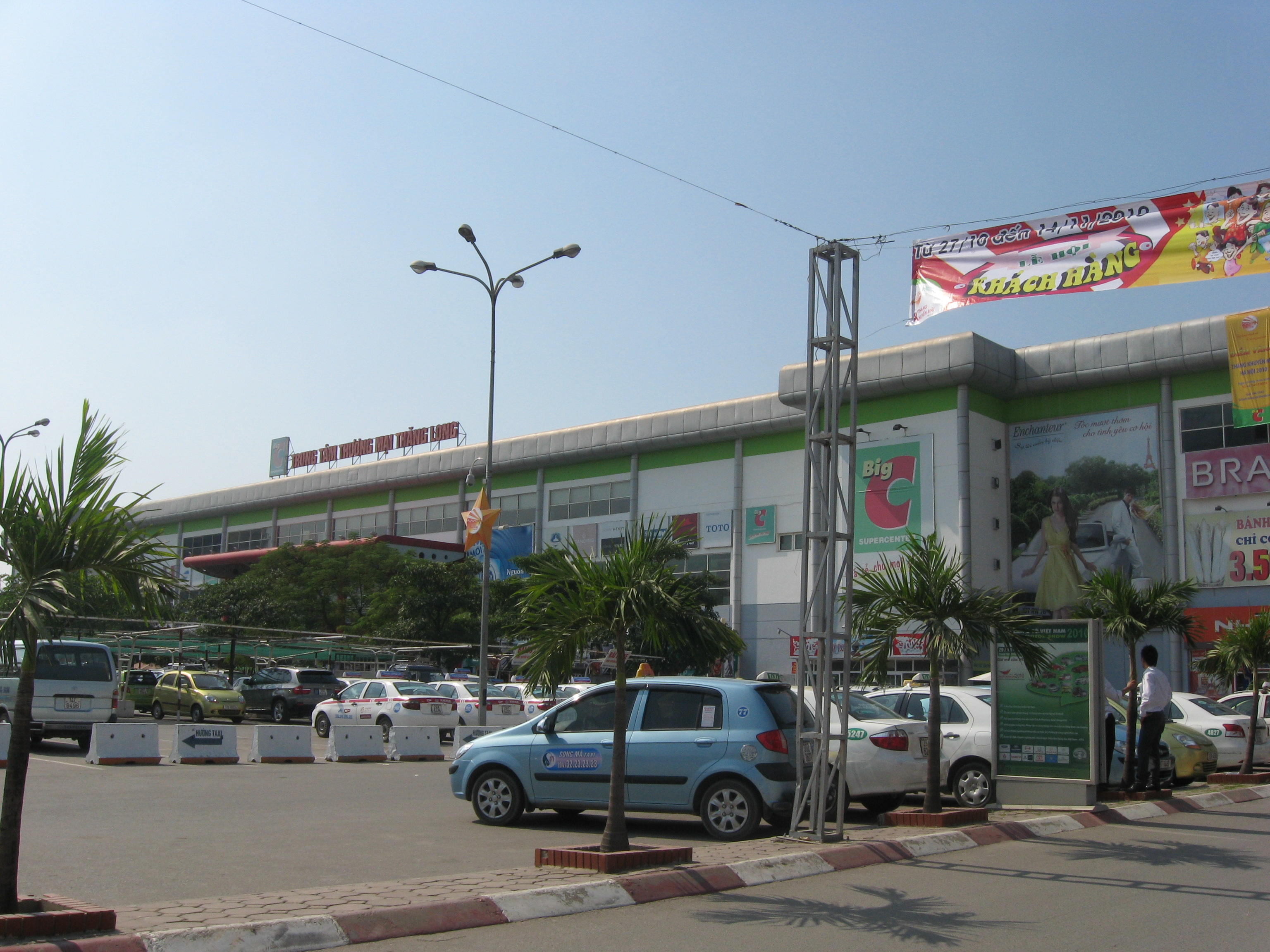 Big C Thăng Long, Hanoi